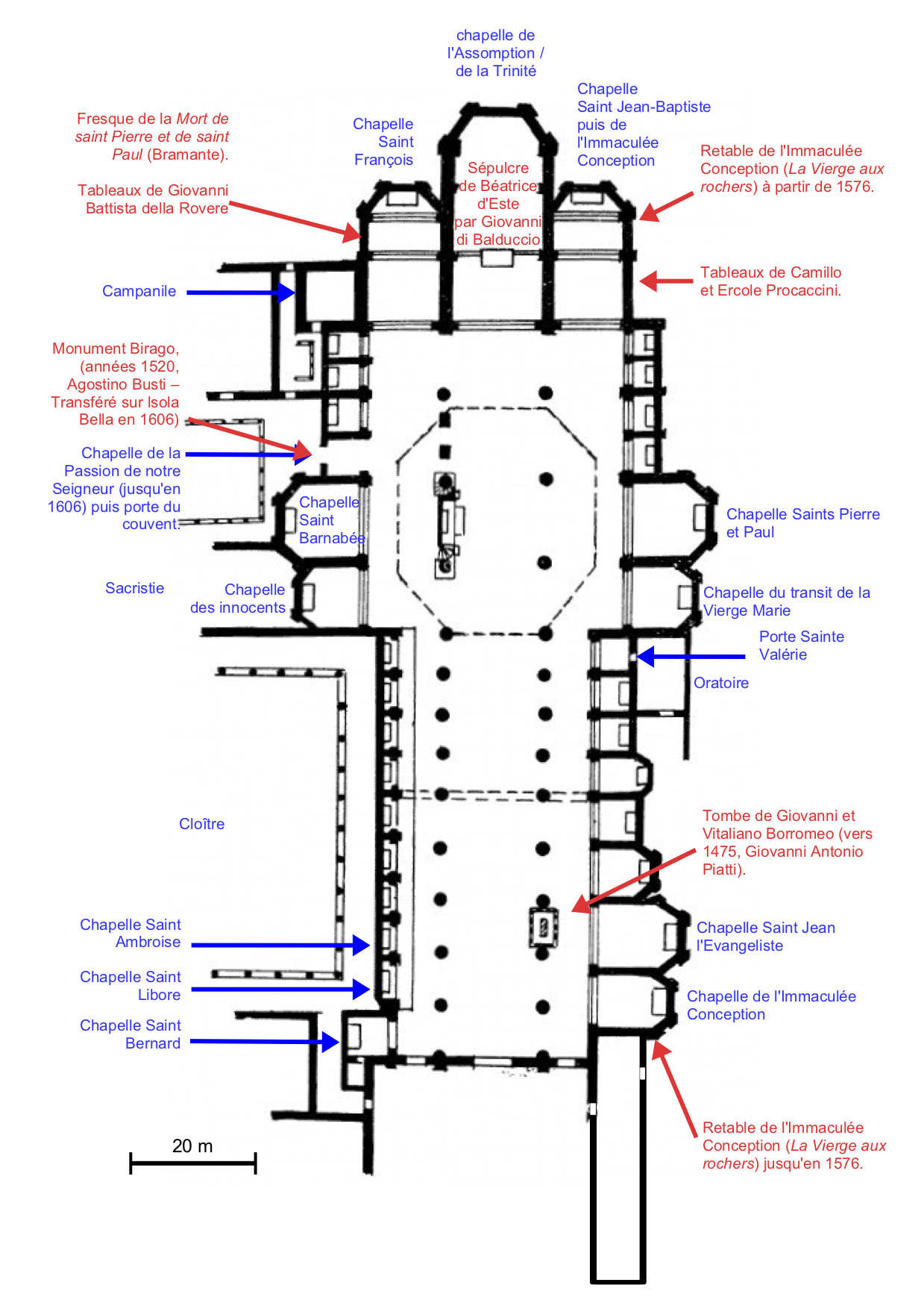 Plan d'une église avec, en bleu, le nom de ses chapelles et, en rouge, les œuvres d'art qu'elle abrite